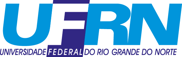 logomarca UFRN